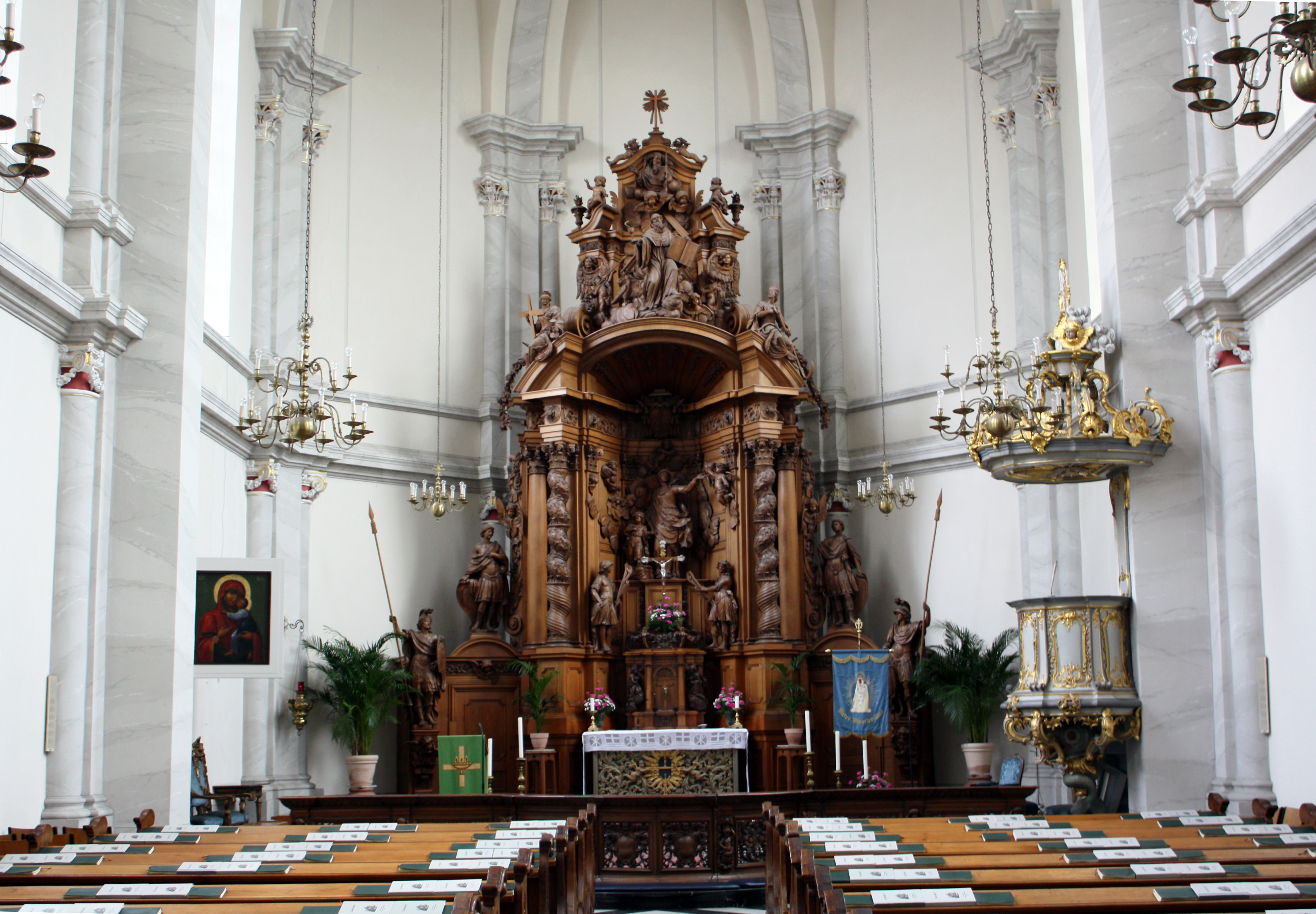 St. Maria in der Kupfergasse, Köln. Vormaliger Standort in St. Makkabäer, Köln.